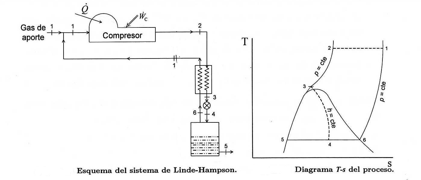 Esquema de una planta de licución de gases mediante sistema Linde simple